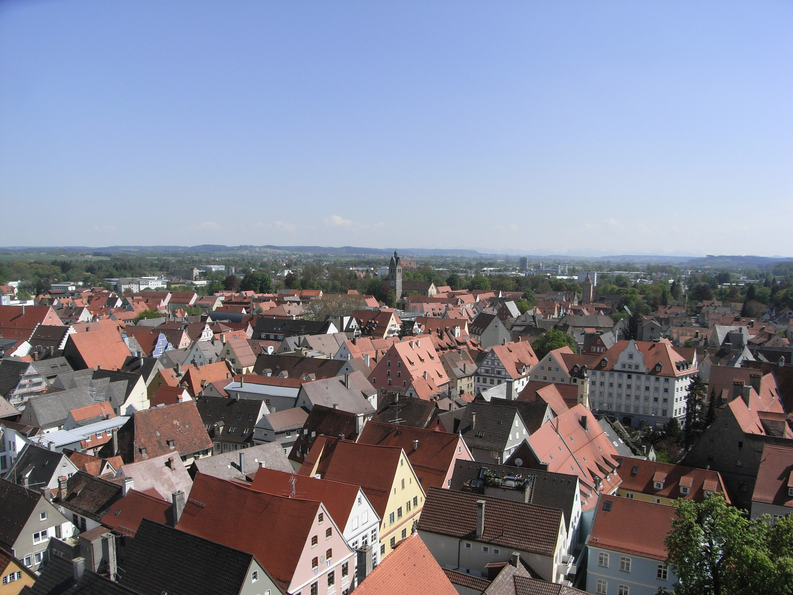 Blick über die südliche Altstadt